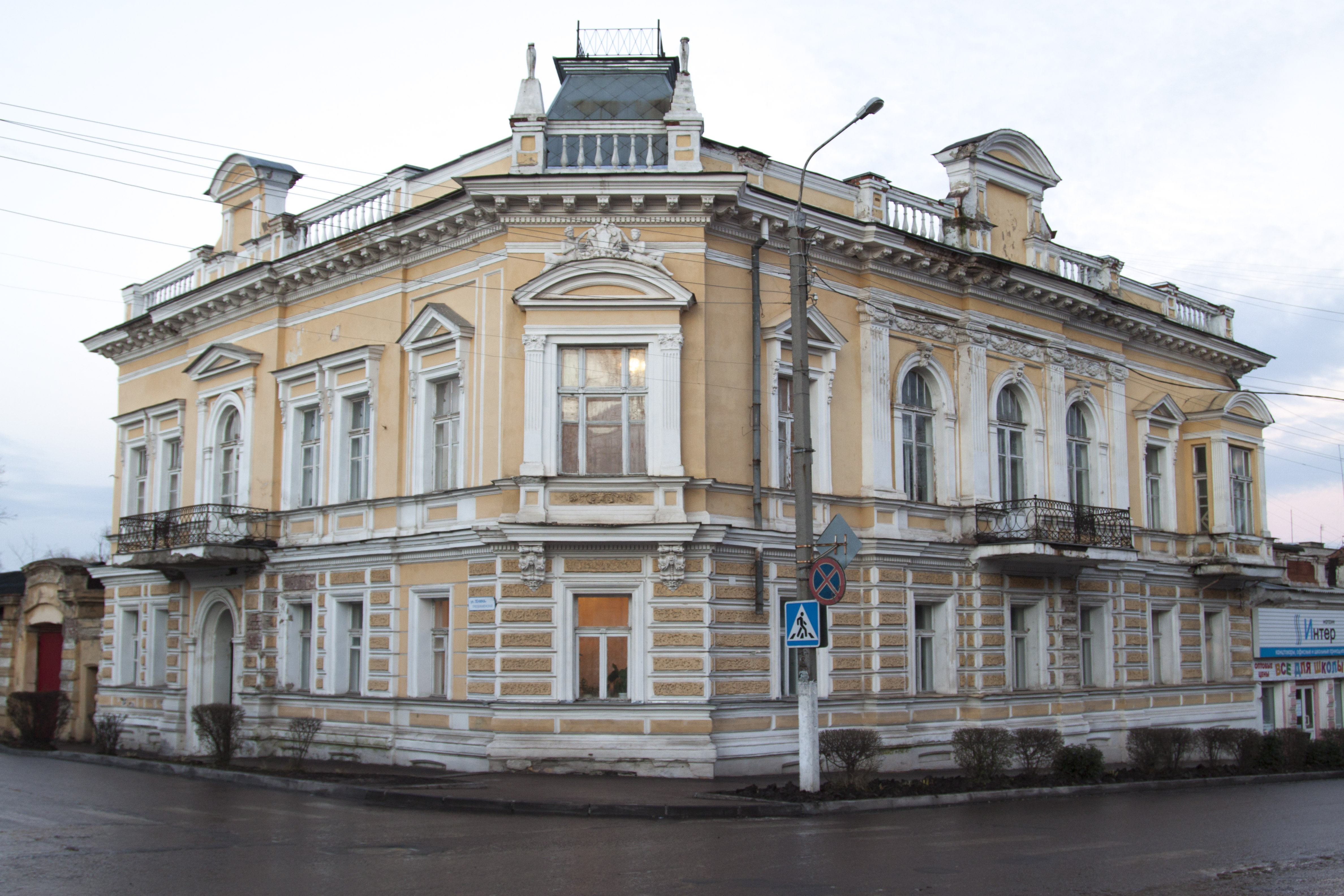 Дом купца Филимонова. Город Рыльск. 2012 год.